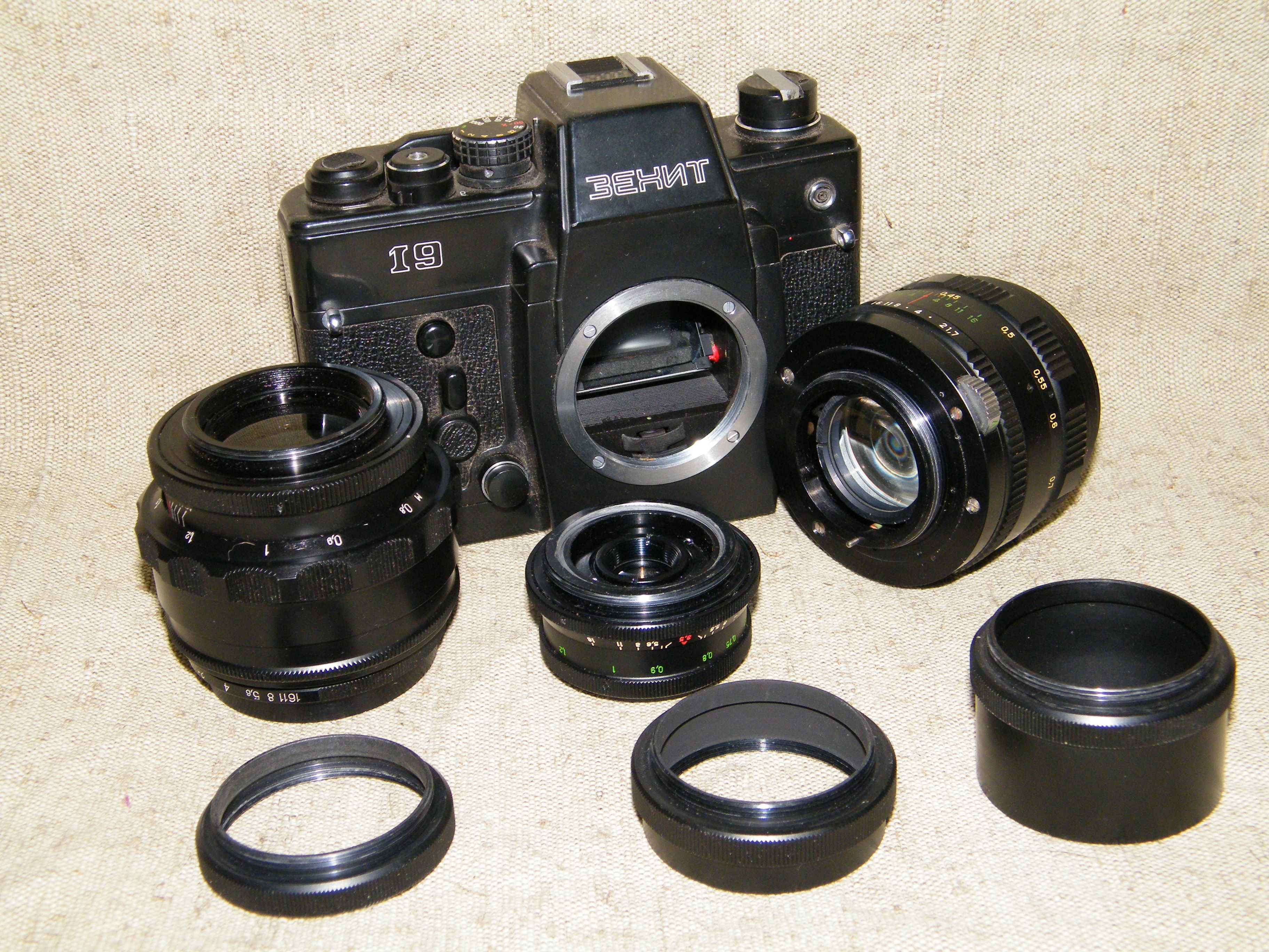 Резьба М42 на 1